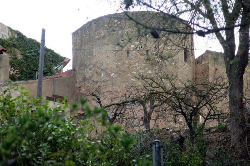 castell de Rocamora a Montferri, comarca de l'Alt Camp - Catalunya